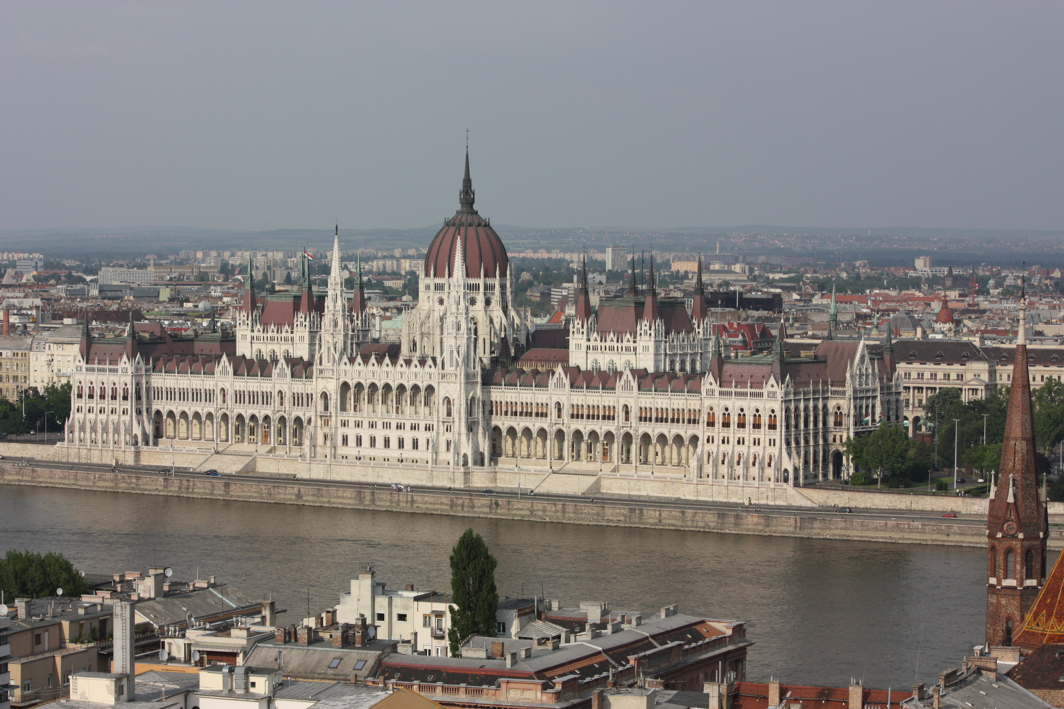 Budapest, Parliament